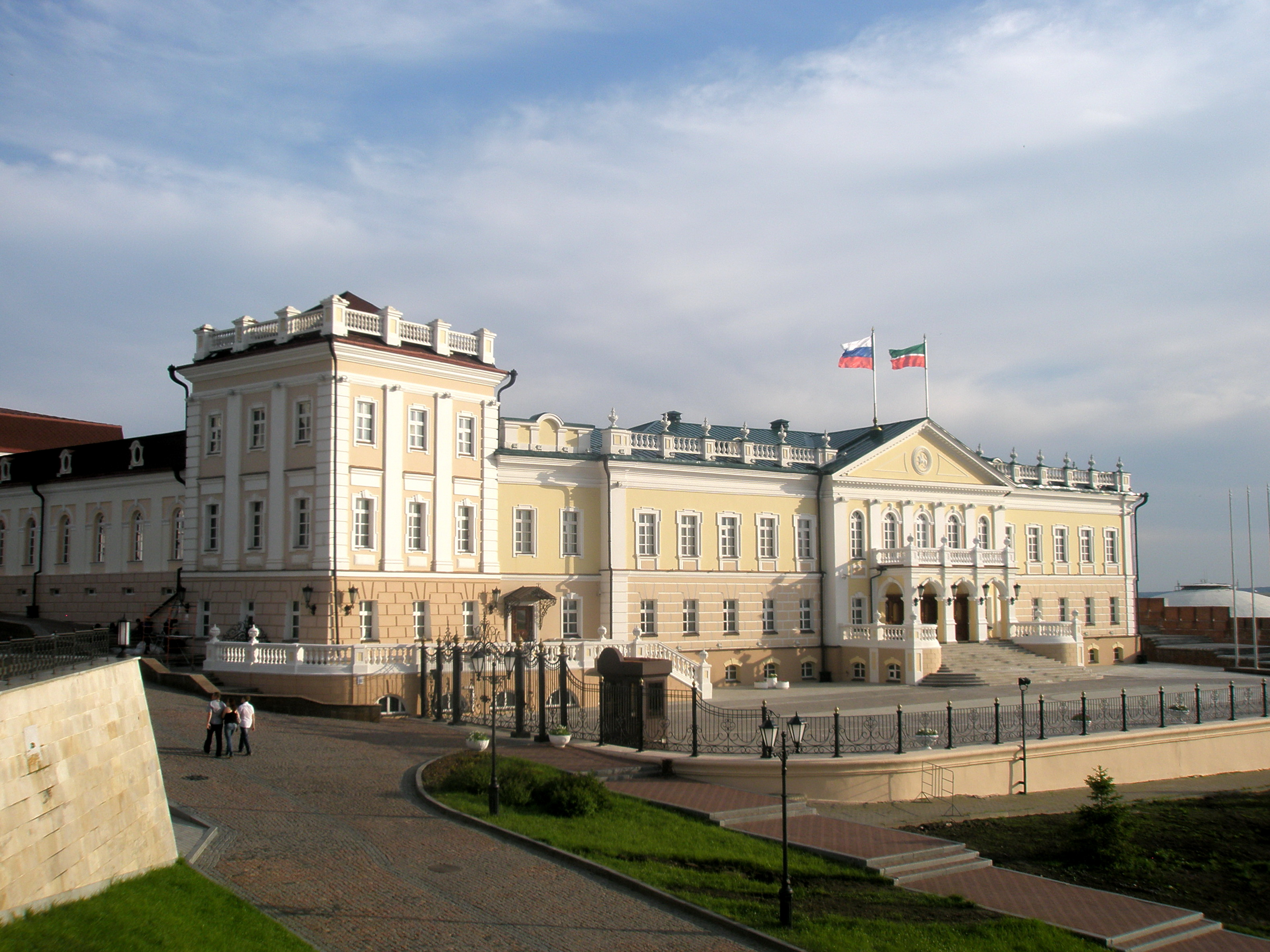 Северный корпус Пушечного двора (Казань)